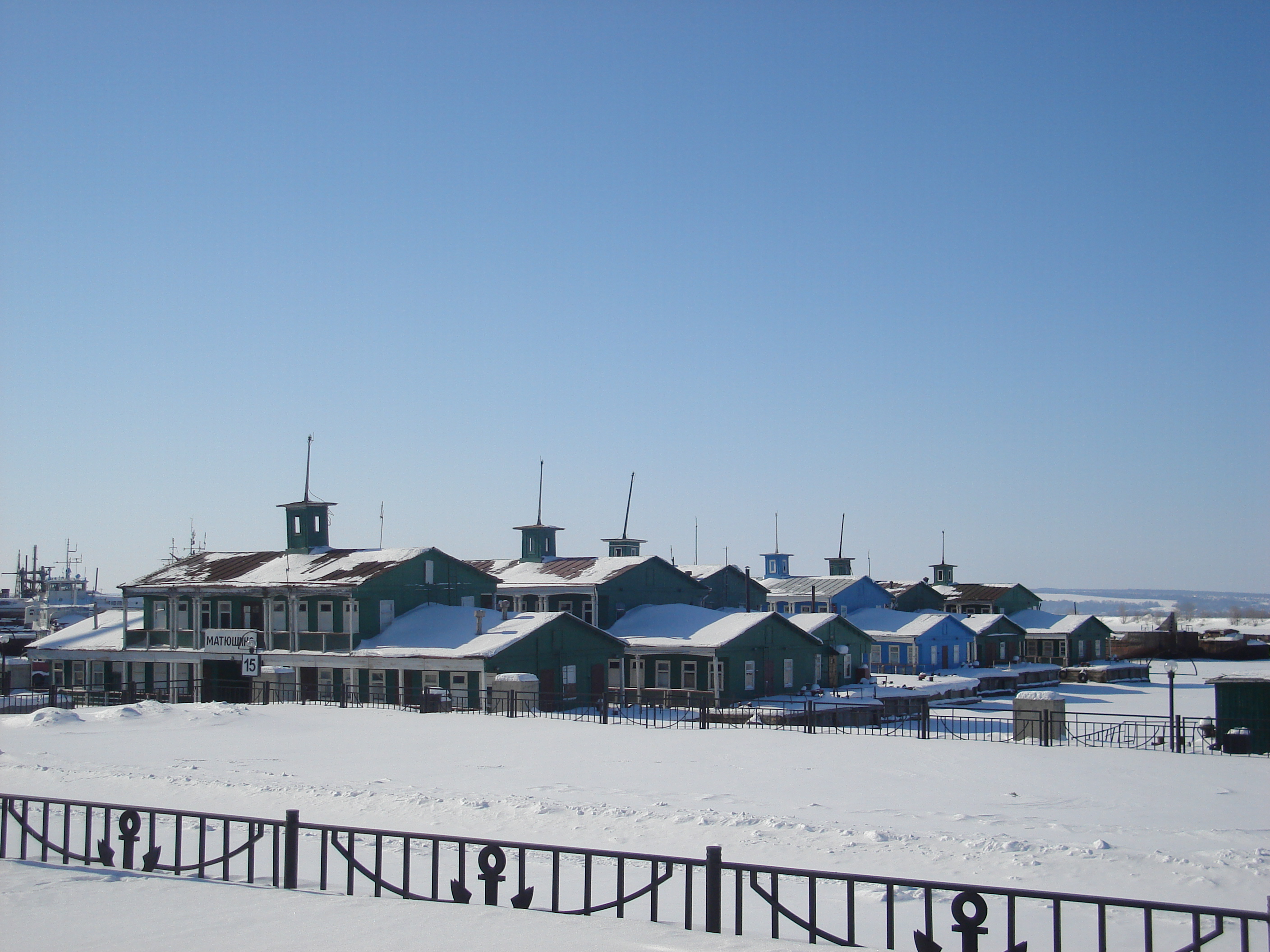 Дебаркадеры зимуют в Казанском порту